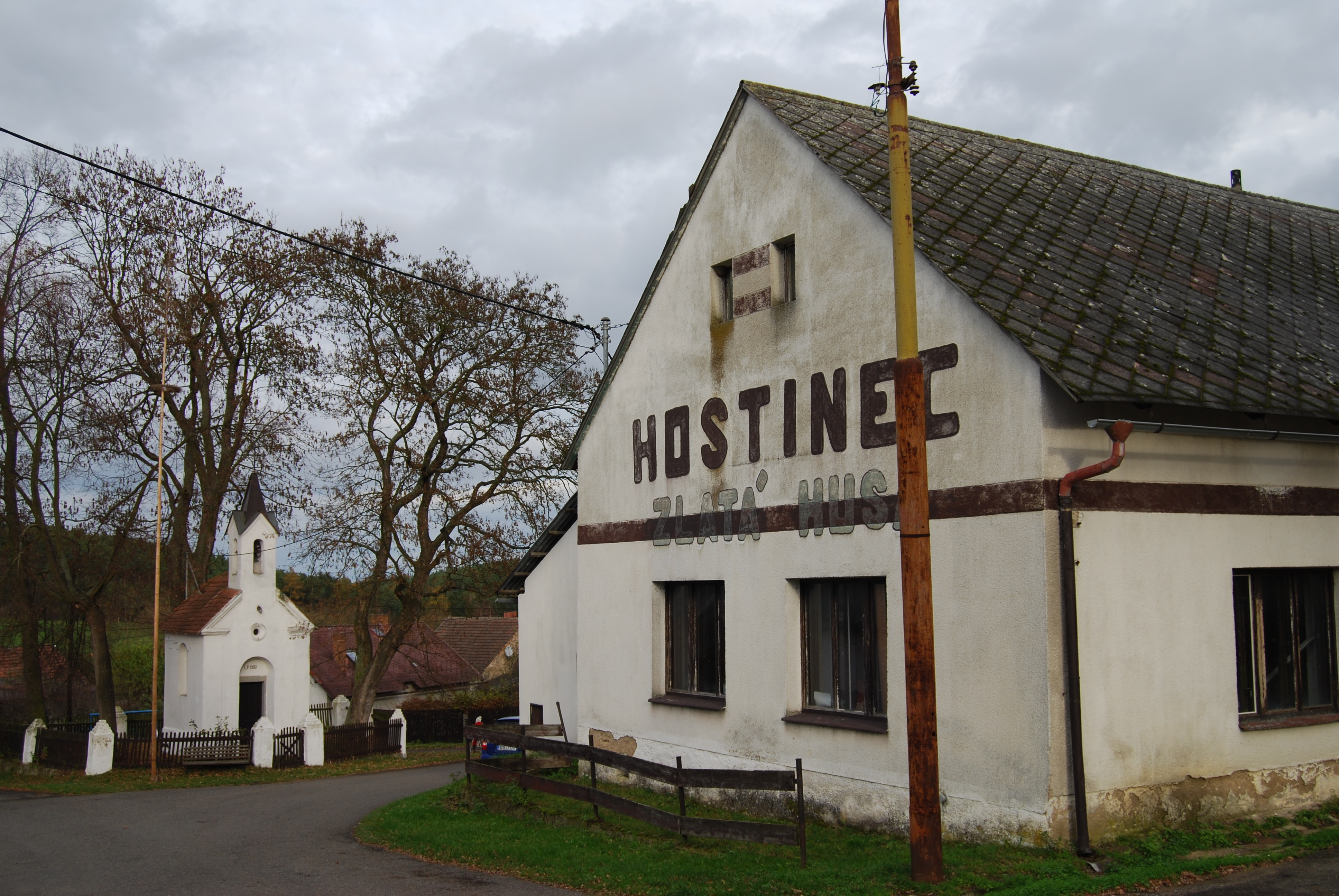 Pohled na část vesnice. Klenovice je část obce Milešov v okrese Příbram. Česká republika.